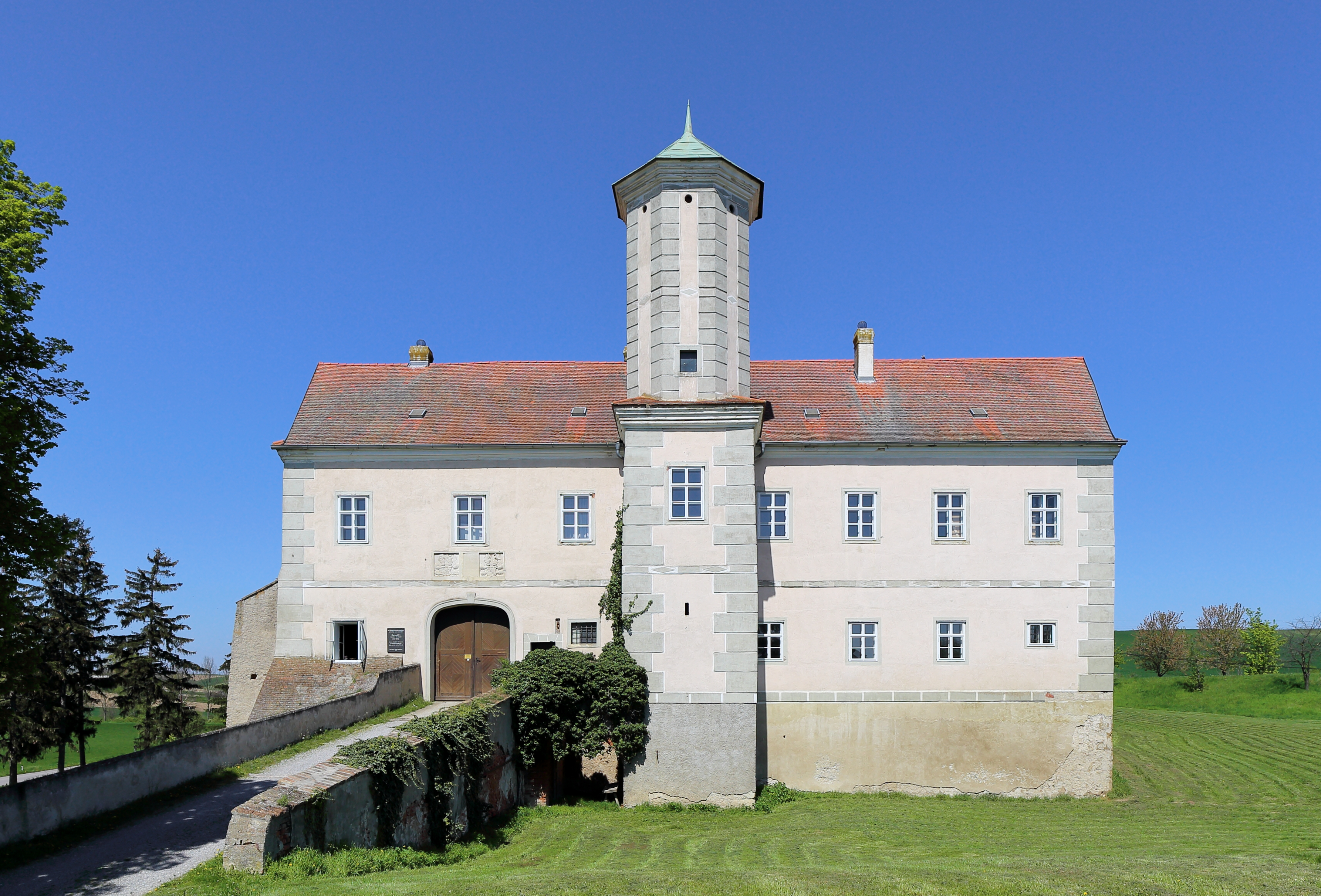 Südansicht bzw. Hauptfassade des niederösterreichischen Schlosses Jedenspeigen im Bezirk Gänserndorf. Ein frühbarocker, vierflügeliger, zweigeschossiger Bau, der ursprünglich von einem Wallgraben umgeben war.